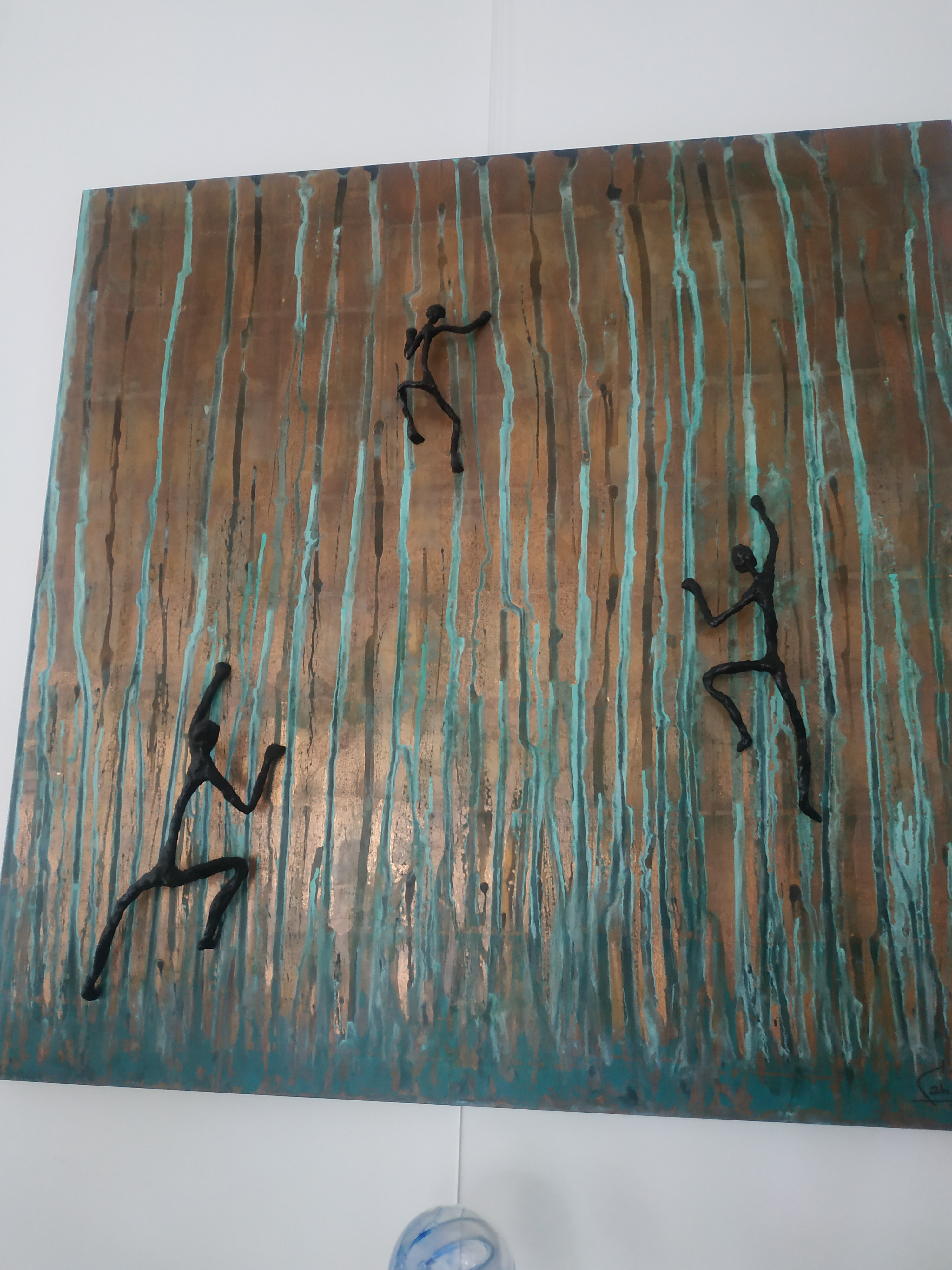 Автор фото я, Ильмира Контини (Франция)